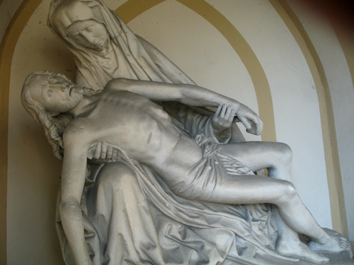 Vesperbild. Kapelle der Kirche St. Aegidius Wiedenbrück